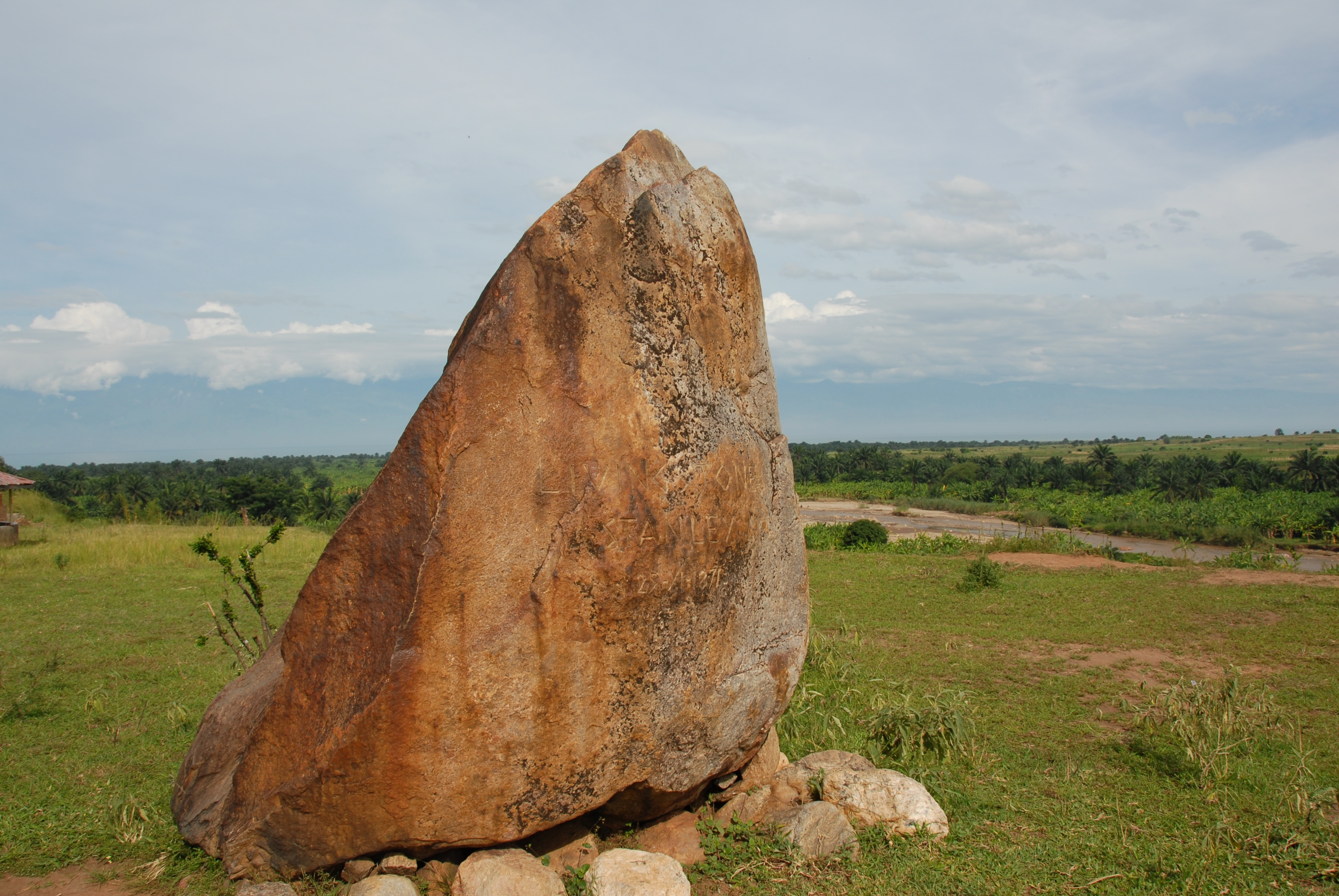 Stanley met Livingstone here on Lake Tanganyika in 1871